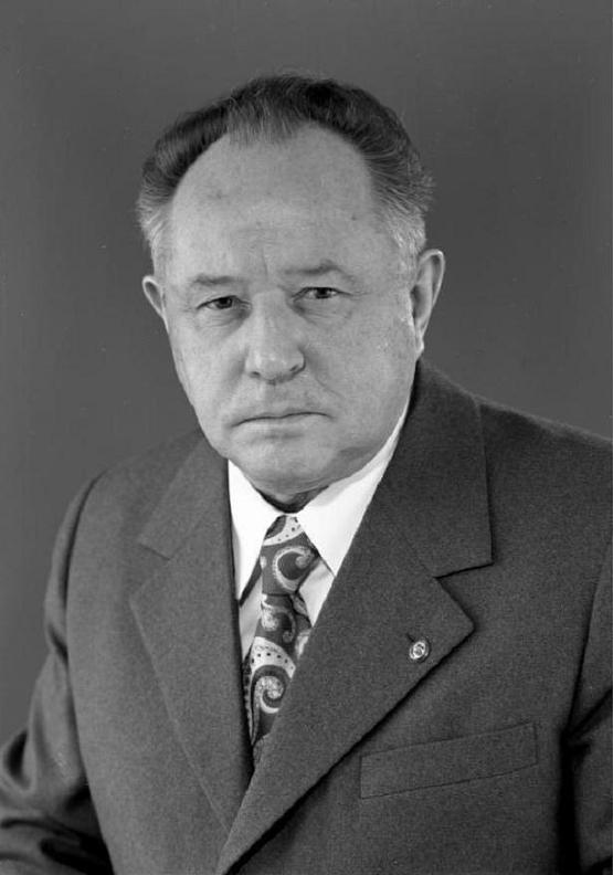 Erich Mielke ADN-ZB / DEWAG 29.6.1981 Mielke, Erich Mitglied des Politbüros des ZK der SED, Minister für Staatssicherheit der DDR, Armeegeneral. Aufn.: 22.5.1976 [Porträt Erich Mielke] Abgebildete Personen: Mielke, Erich: Minister für Staatssicherheit, Armeegeneral, Politbüro des Zentralkomitees (ZK) der SED, DDR (GND 118977490)